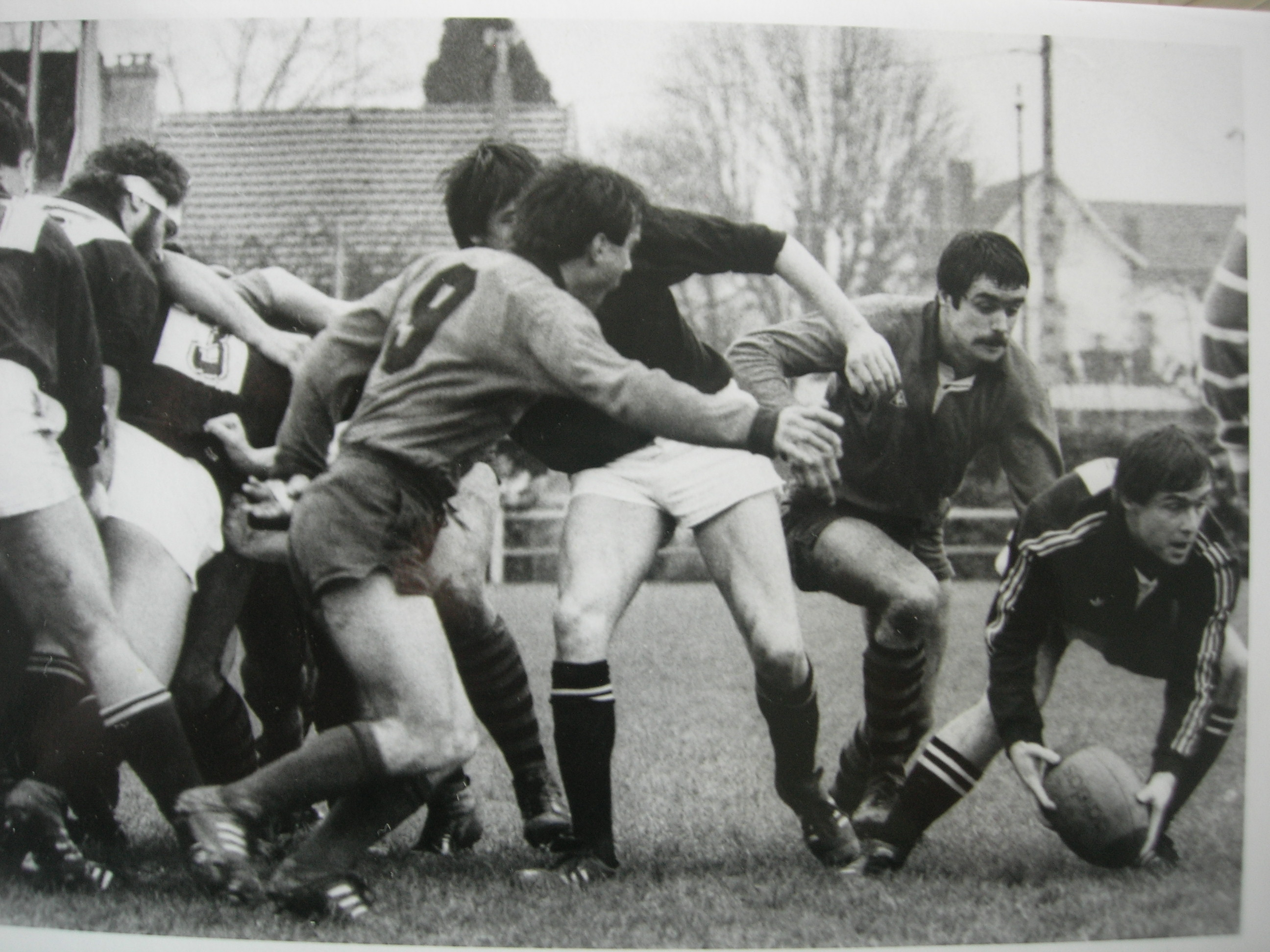 USFL Années 80